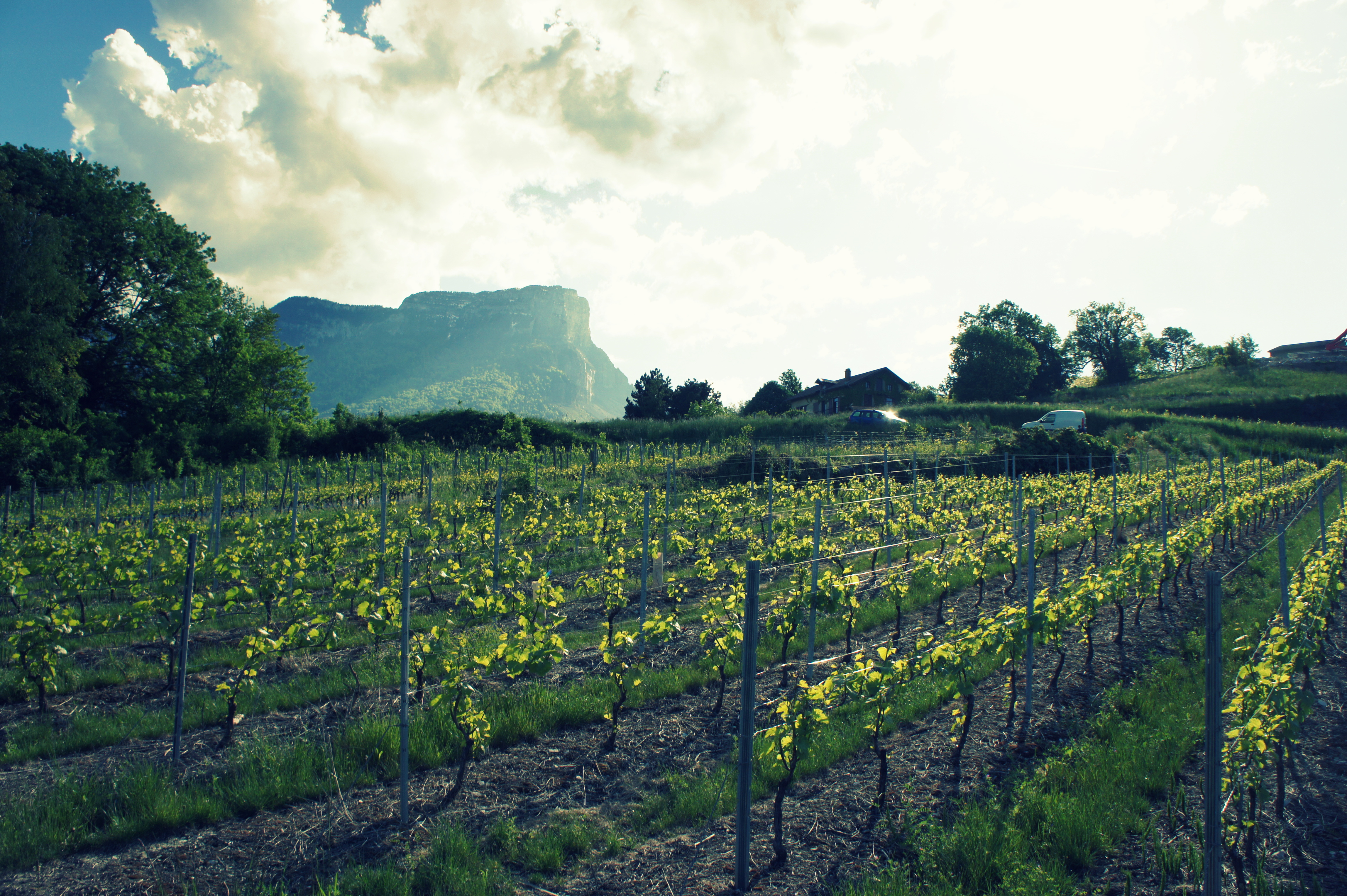 dans les vignes d'Apremont et des Abymes